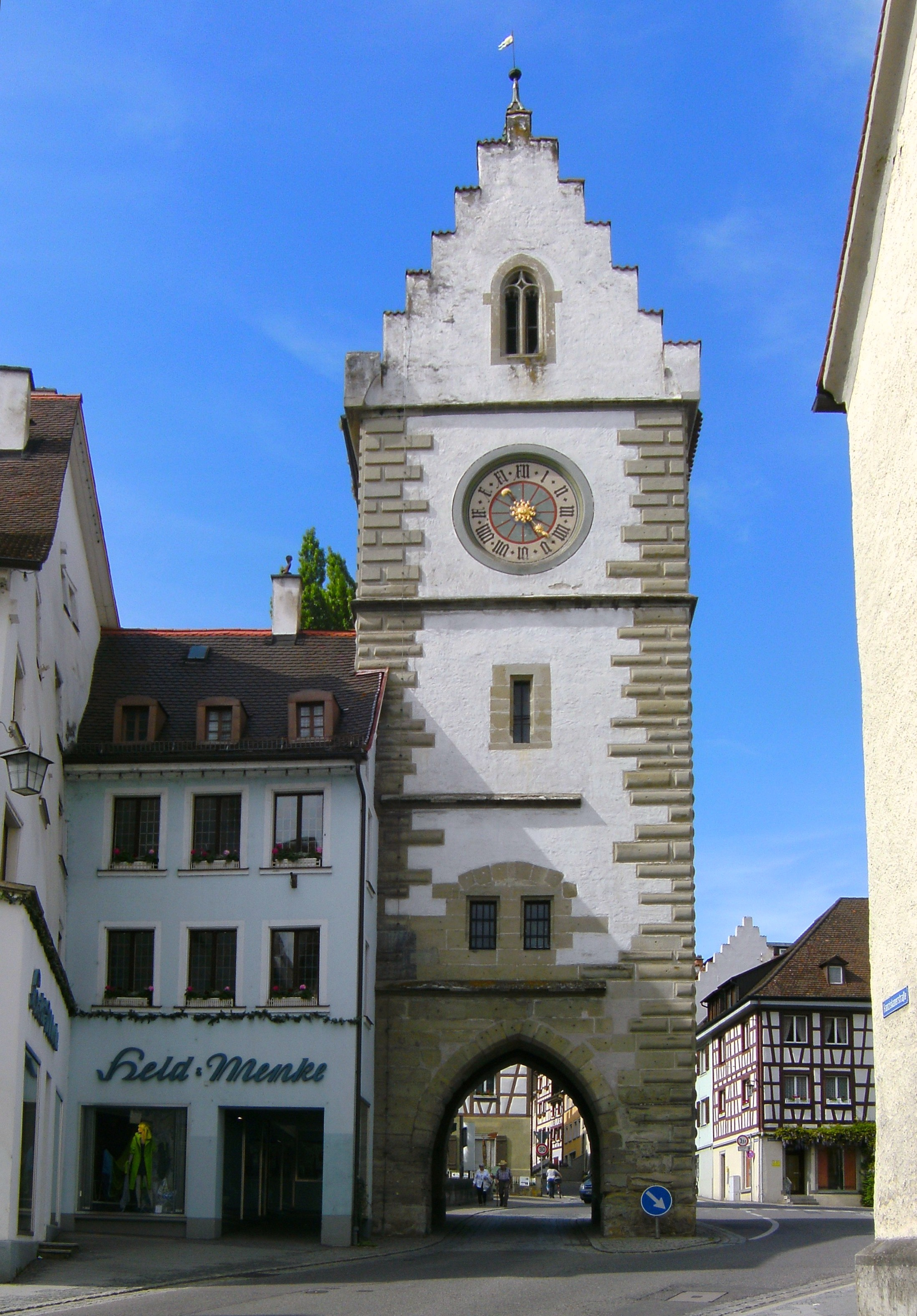 Franziskanertor in Überlingen